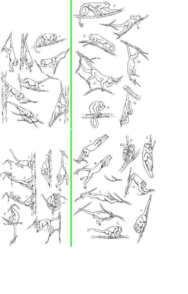 Locomoción Allouata palliata